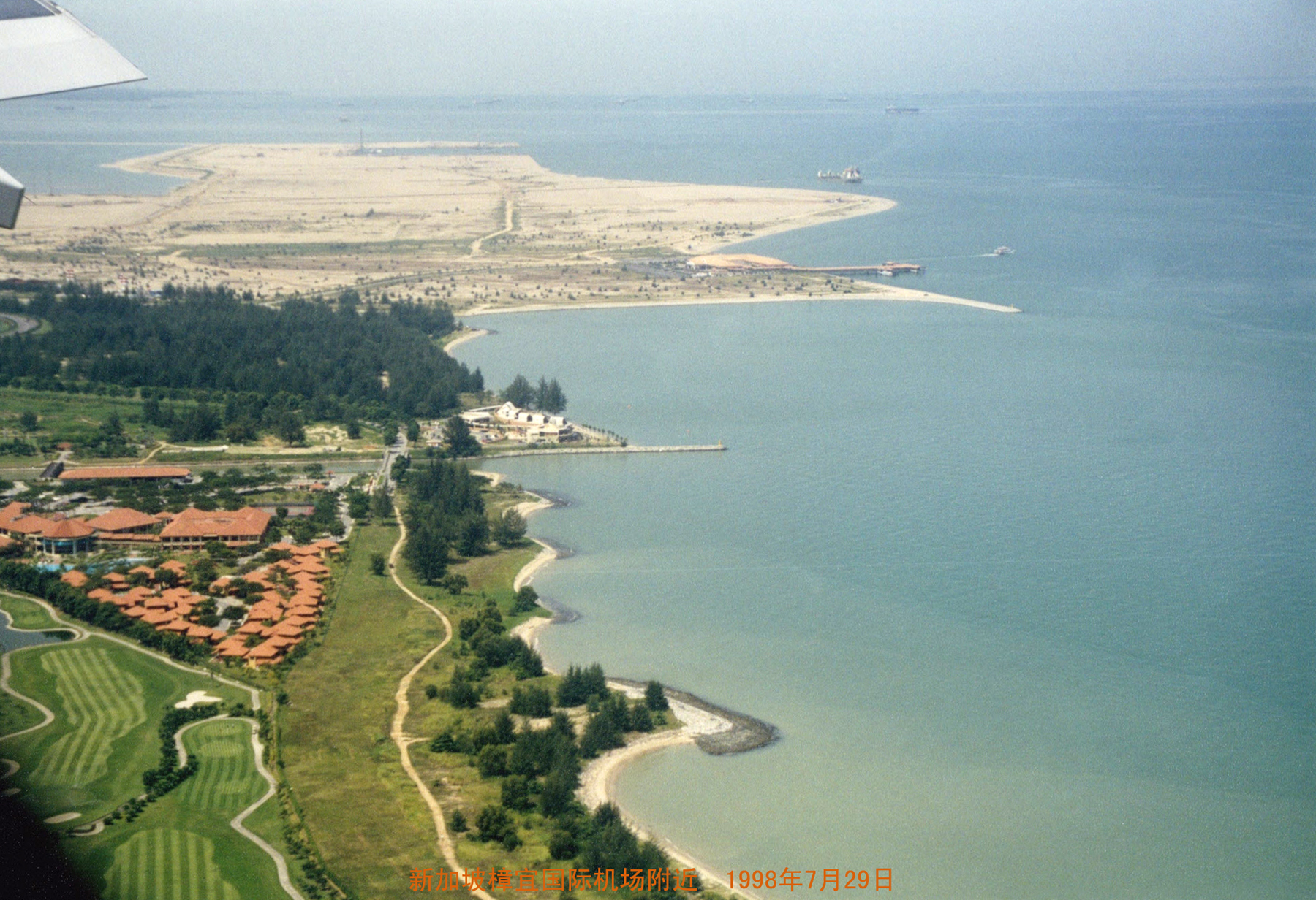 1998年新加坡樟宜国际机场附近 landing soon at Airport Changi